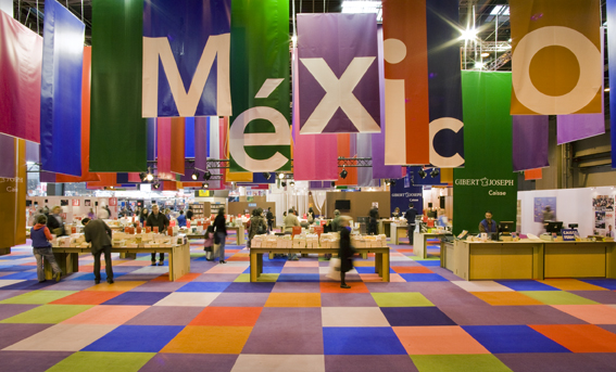 El pabellón de México cuenta con una fuerte personalidad y mucho carácter, que muestra un país vivo y alegre, poseedor de una gran tradición cultural, y al mismo tiempo un país moderno y contemporáneo que sabe convivir con su historia.